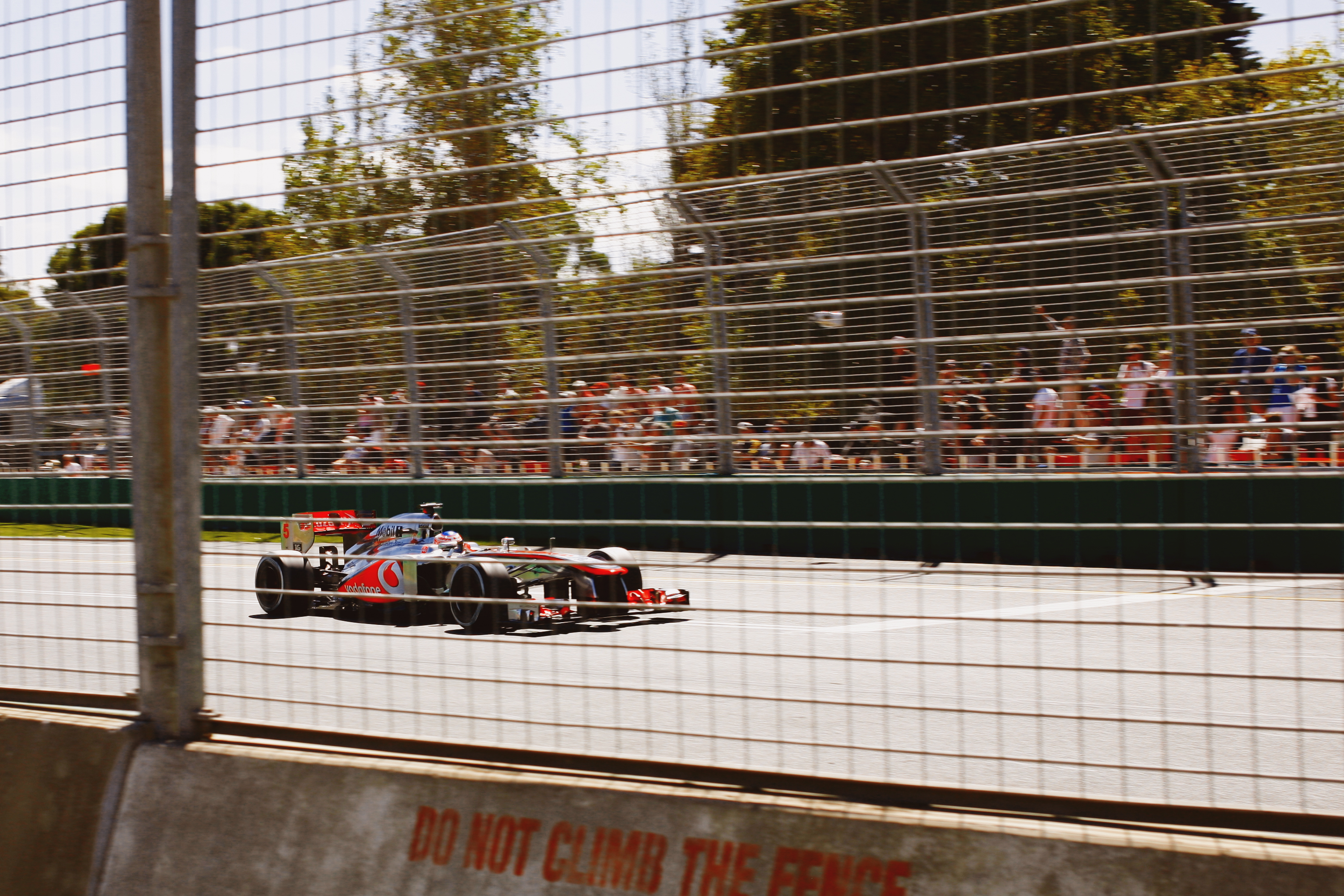 McLaren at Formula 1 Melbourne GP 2013